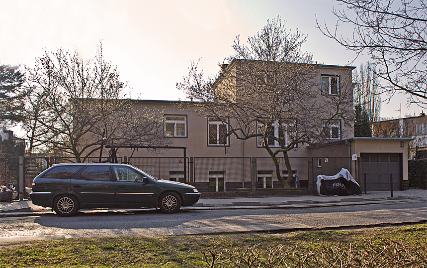 Wzorcowy dom nr 28 z wystawy WuWA przy ul. Dembowskiego 7